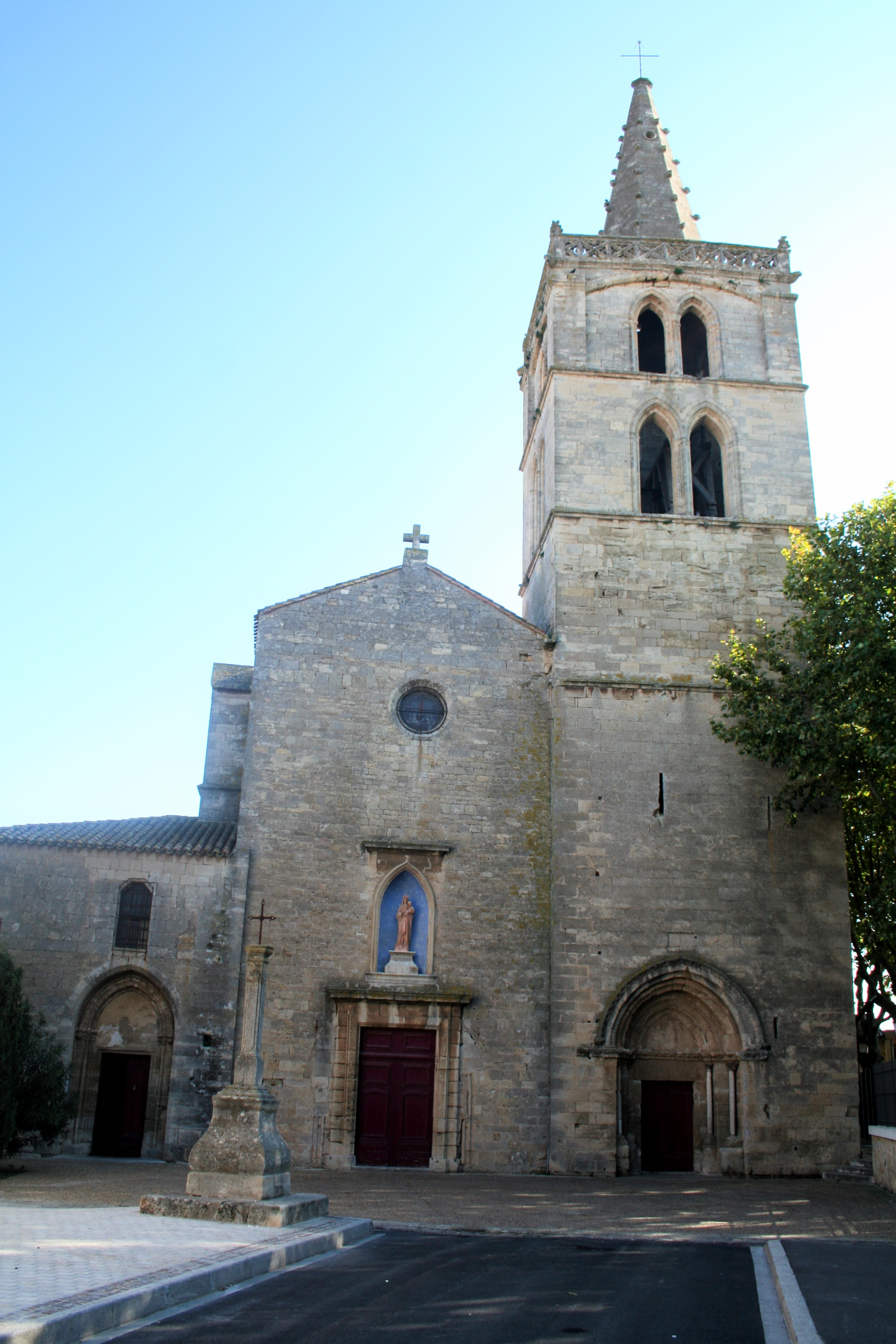 Sérignan (Hérault) - Collégiale Notre-Dame de Grâce.